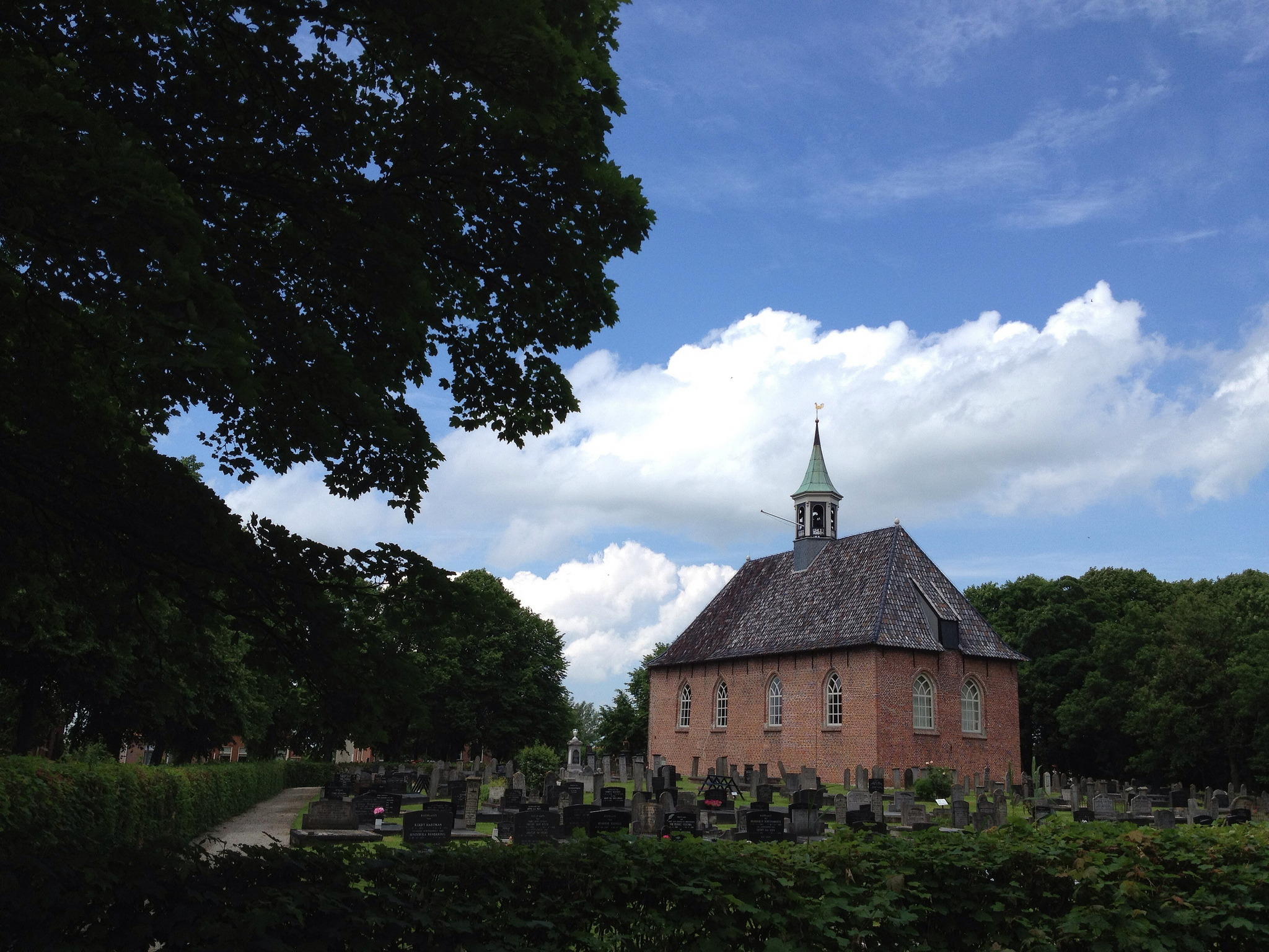 "... kerk van Nieuw-Scheemda uit 1661 heeft een kerkorgel uit 1698. Het geldt als het kleinste Arp Schnitger-orgel ter wereld en is in 1802 door Heinrich Hermann Freytag verbouwd."